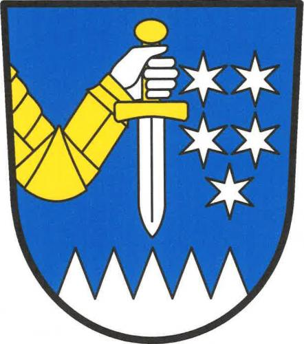 Nejepín znak